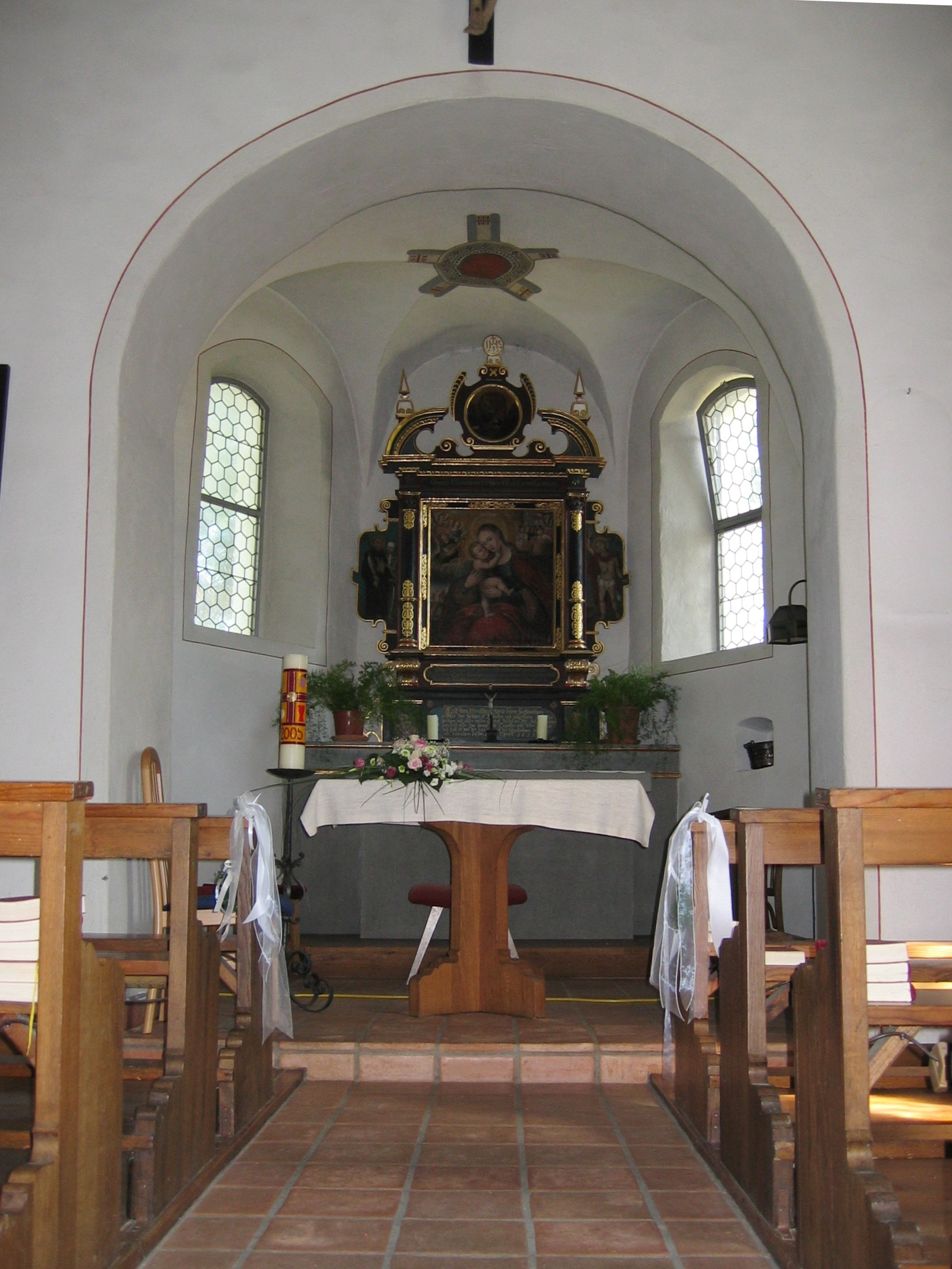 Bangs, Kapelle, Altar